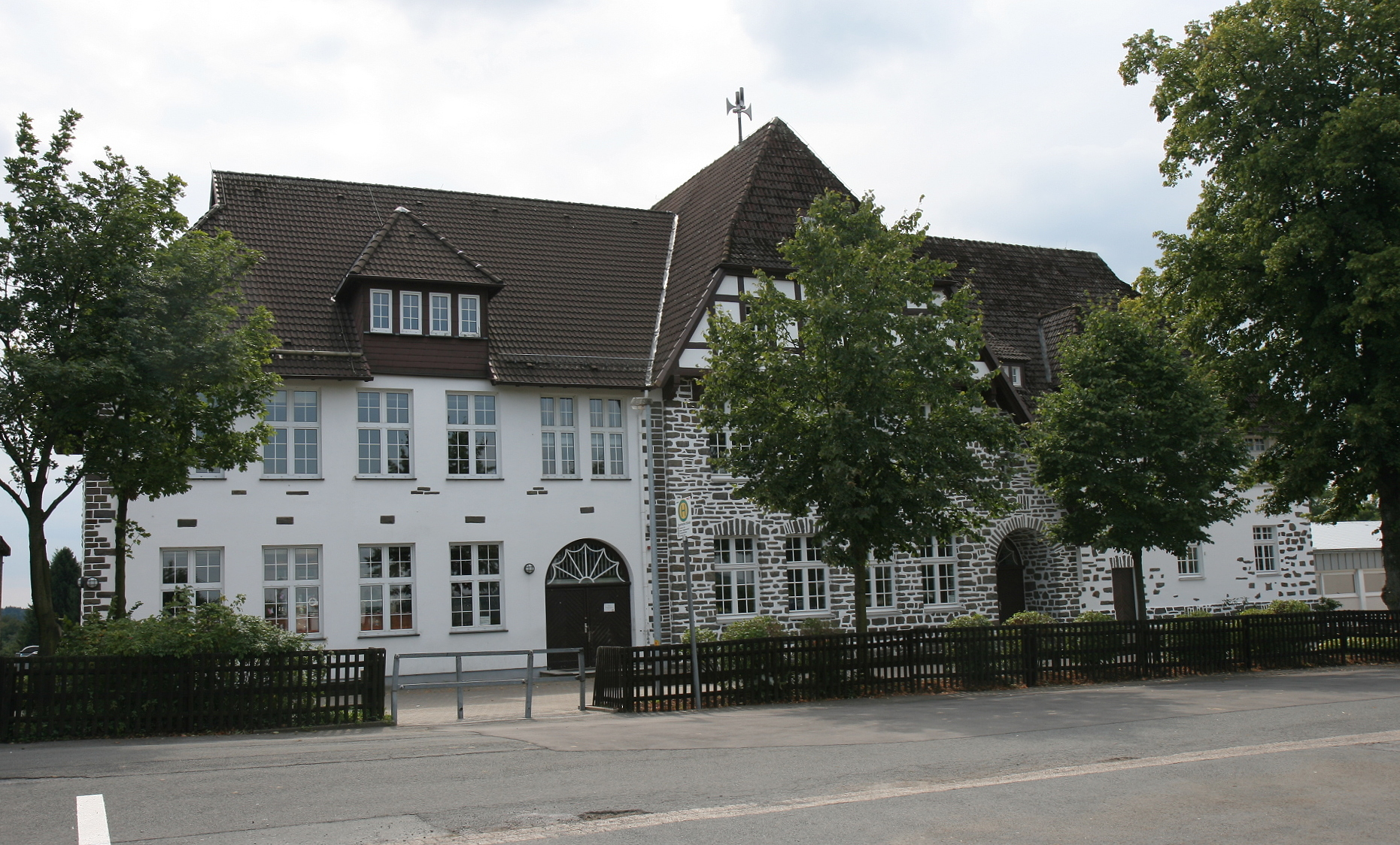 Grundschulgebäude Schalksmühle-Spormecke. Erbaut 1911, linker Anbau aus dem Jahr 1986. Eingetragen in der Denkmalliste seit dem 15. Dezember 1983.